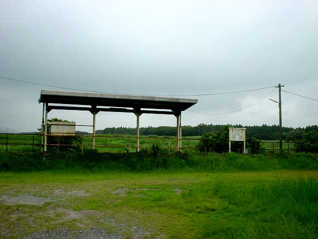 薩摩塩屋駅（2005年7月投稿者が撮影）